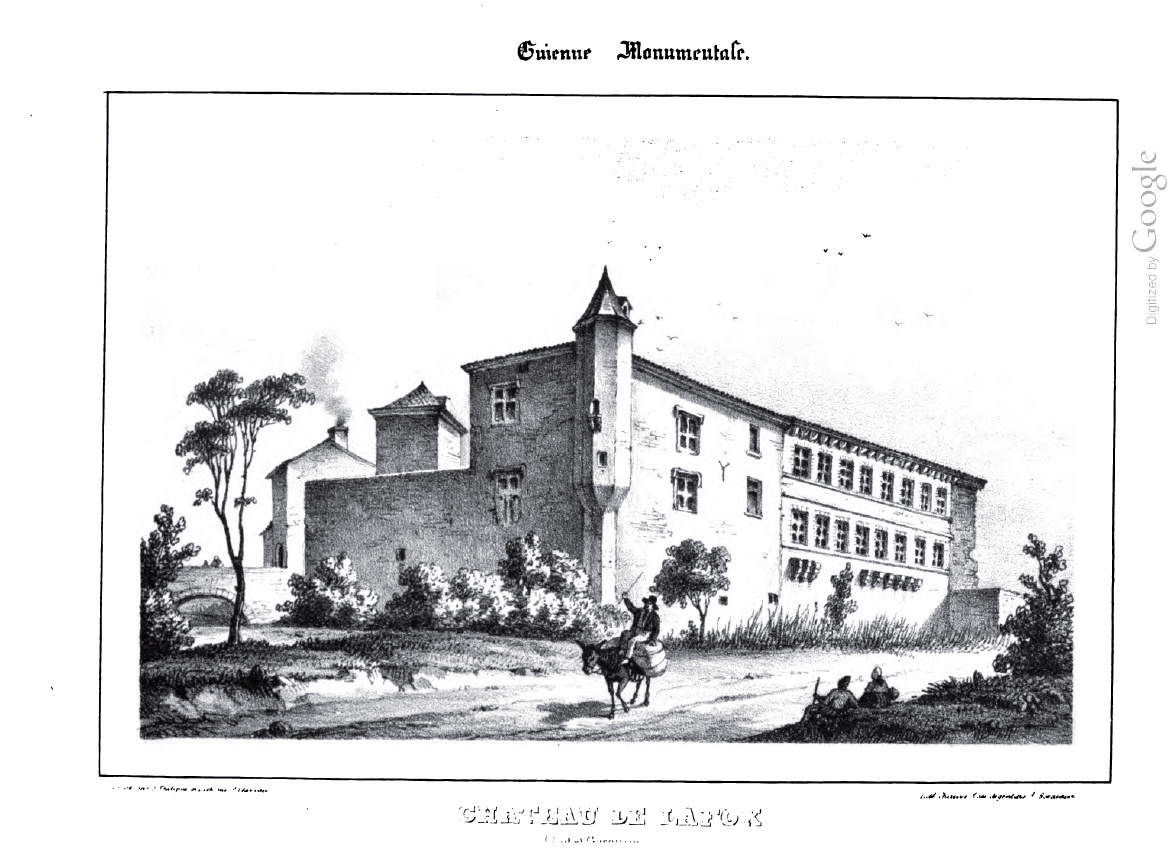 Château de Lafox (Lot et Garonne)